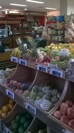 Encontro típico da cultura brasileira: barraca de frutas e sushi